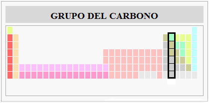 Grupo IV A